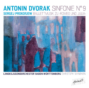 Cover der CD Antonin Dvorak: Sinfonie Nr. 9 e-Moll, op. 95 "Aus der Neuen Welt" vom LJO BW